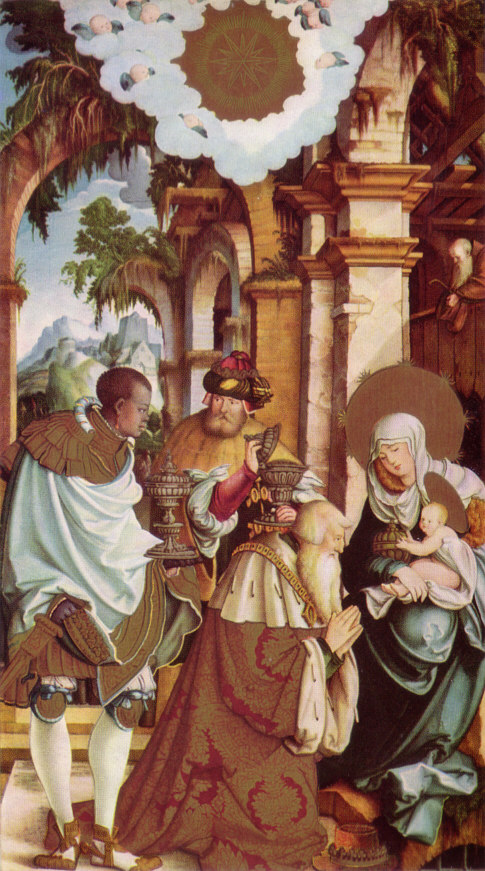 Meister von Meßkirch: DreikönigsbildStadtpfarrkirche St. Martin Dreikönigsaltar